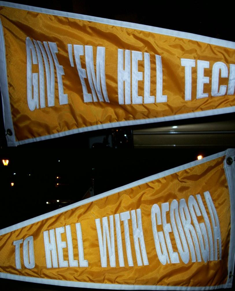 (John Bird, self-taken, 2006)